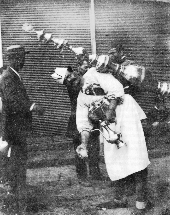 Jewish lemonade seller in Salonika (Thessaloniki)